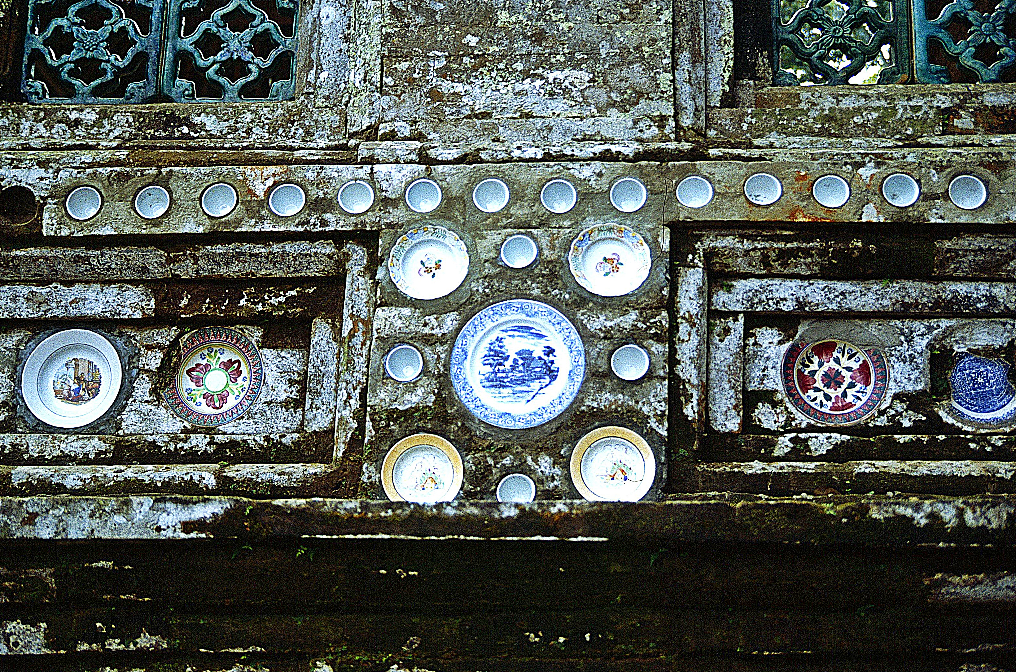 Bangli: Pura Kehen, Teller aus chinesischem Porzellan